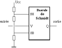 Bascule de Schmidt : symbole et mise en œuvre